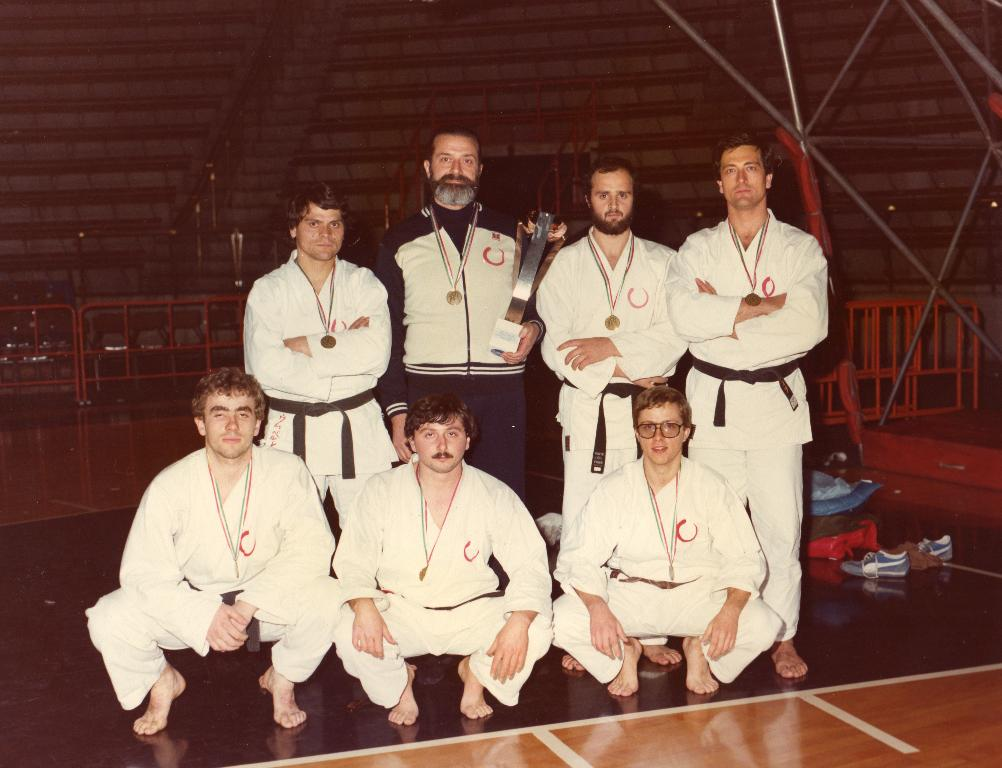 Squadra 3ª classificata campionato italiano serie A anno 1980, Musokan Portici.